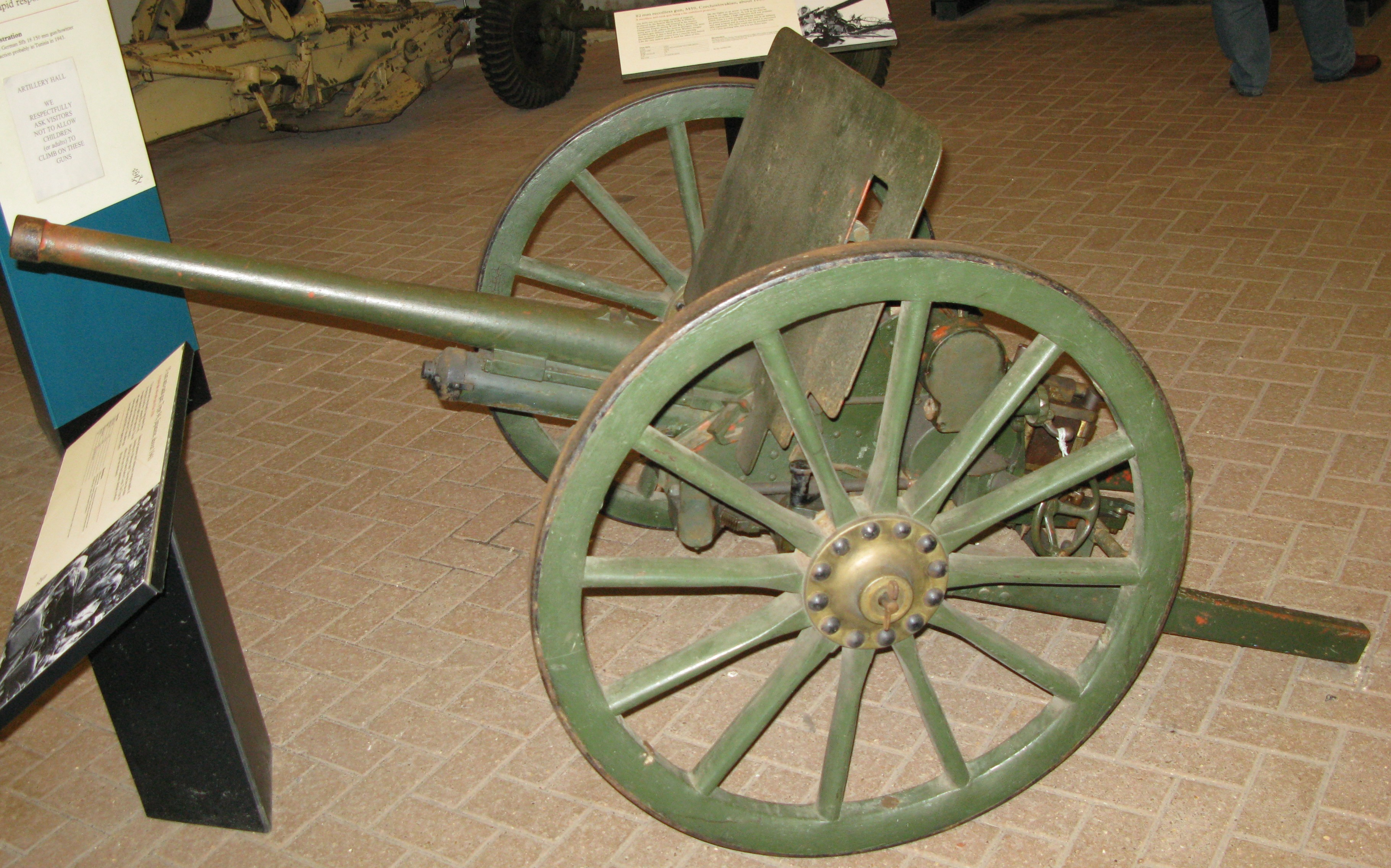 Type 94 37 mm Anti-Tank Gun